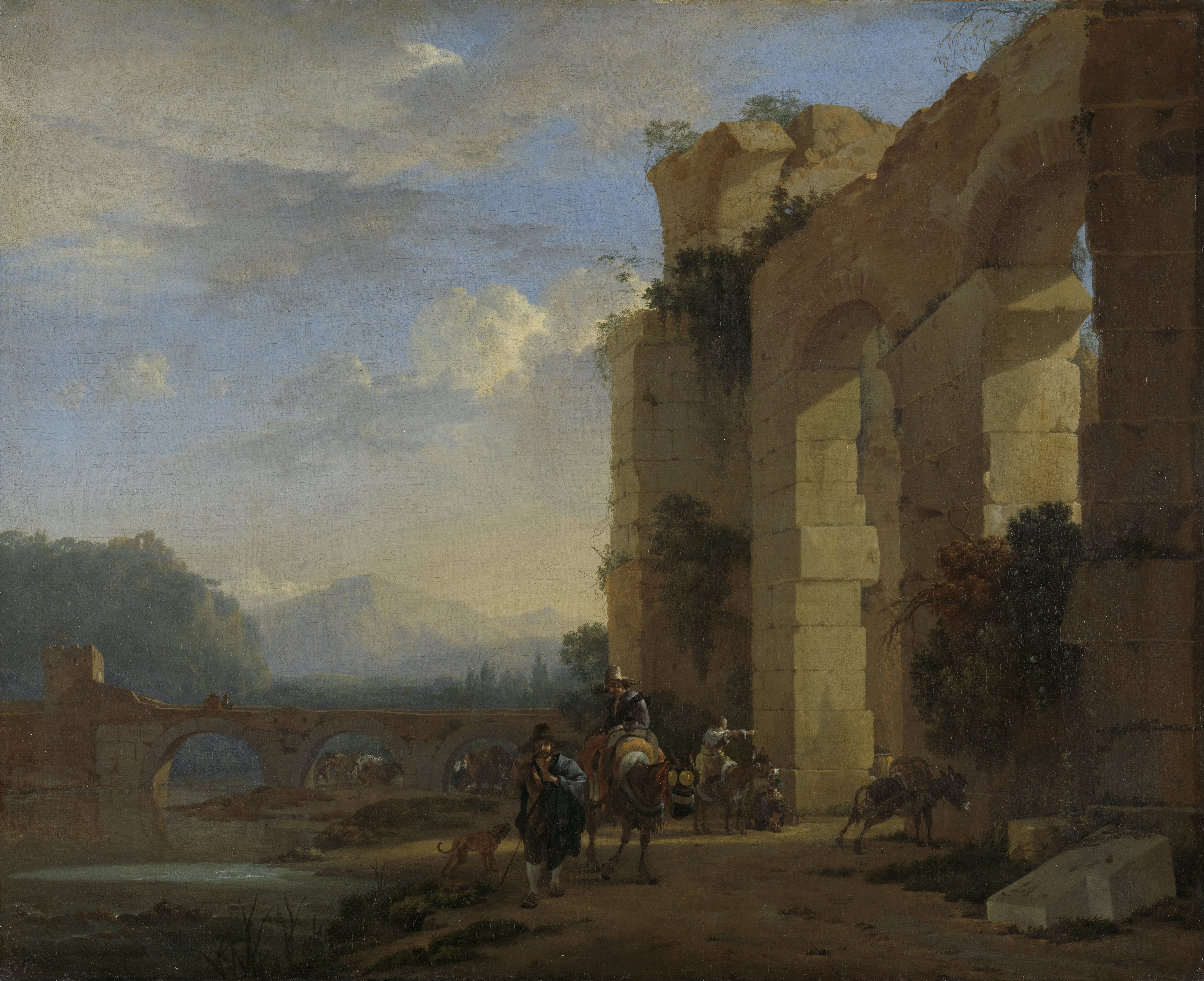 Ezeldrijvers bij een Italiaanse ruïne, in de verte een oude stenen brug.; Jan Asselijn (1610–1652), olieverf op doek, ca. 1650